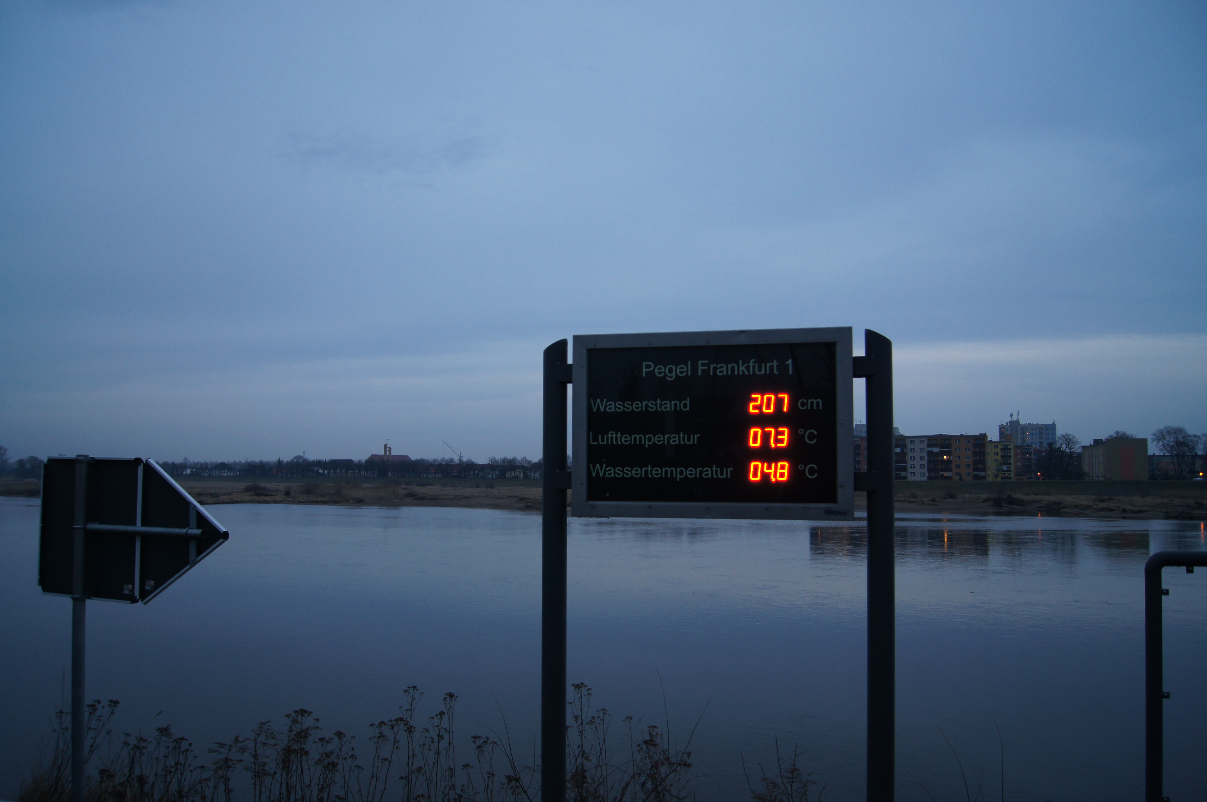 Oderpromenade in Frankfurt (Oder), Brandenburg, Deutschland